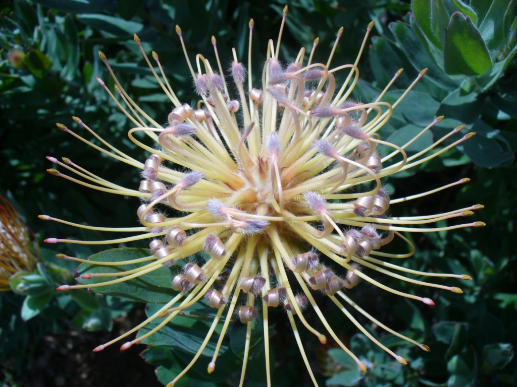 Kirstenbosch 2006 Andrew Massyn